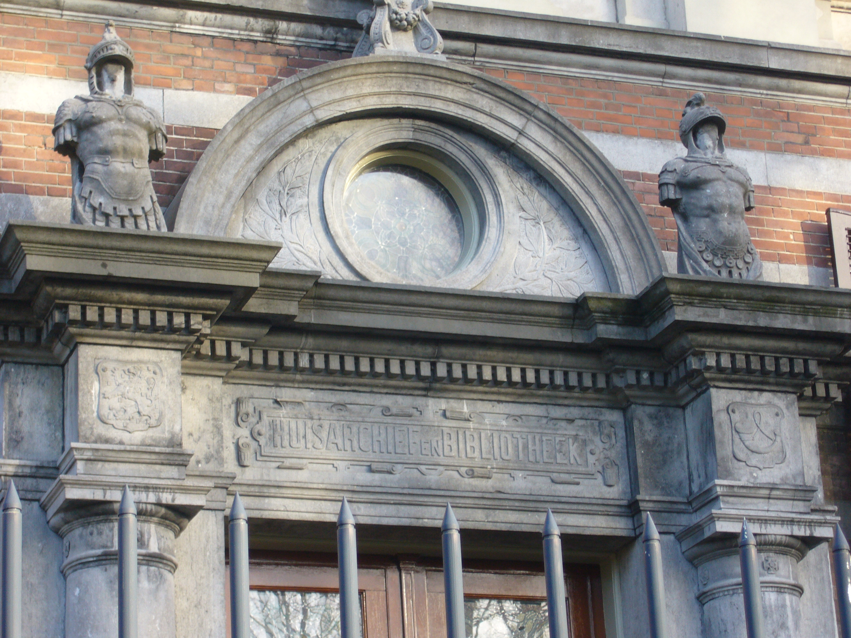 Paleis Noordeinde, archief, detail boven de deur